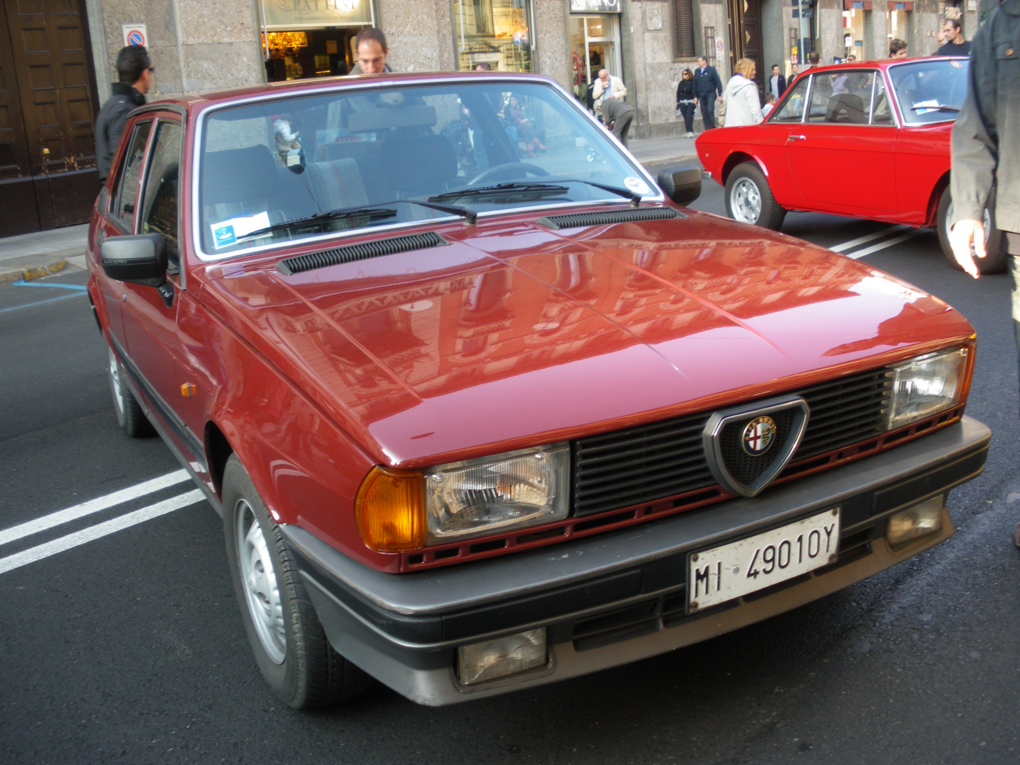 Una Alfa Romeo Giulietta del '77 a Milano